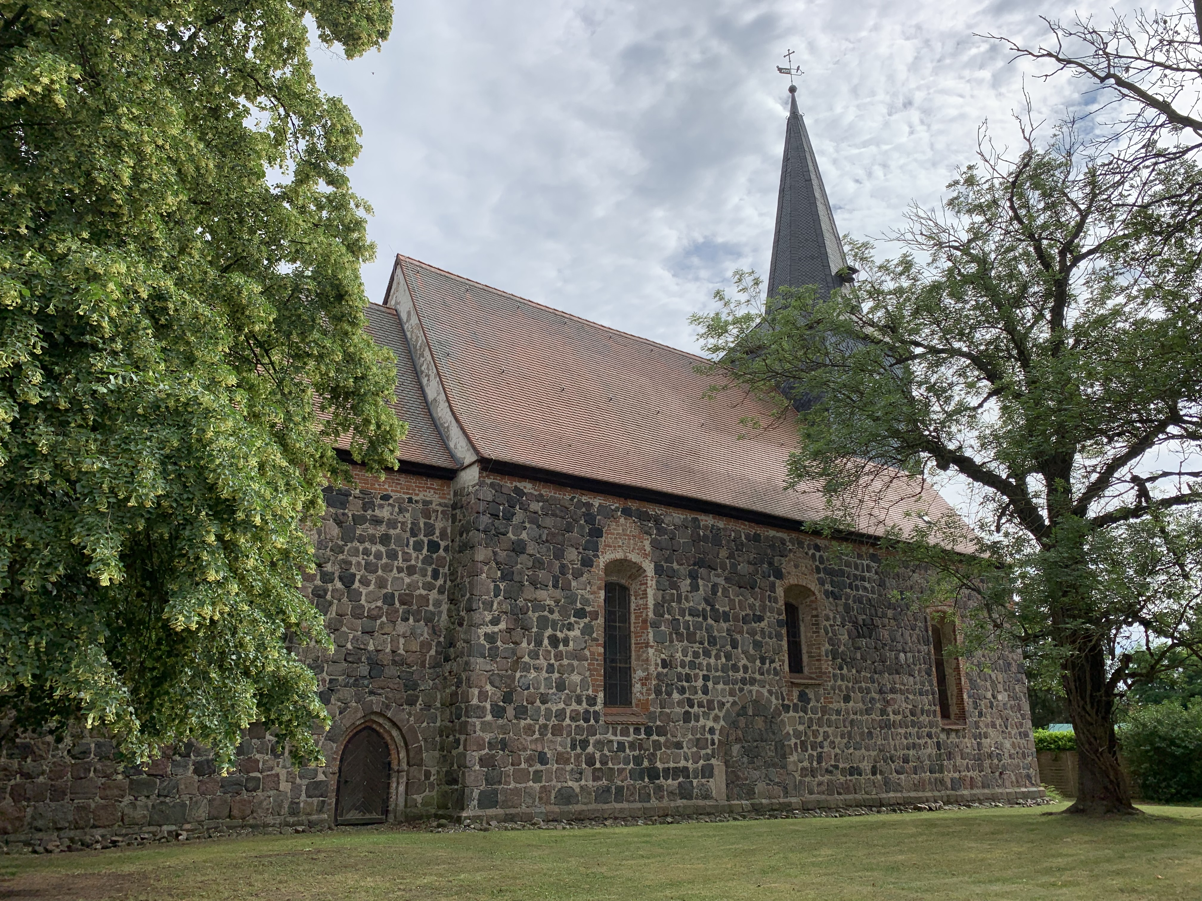 Die Dorfkirche Dabergotz im Landkreis Ostprignitz-Ruppin in Brandenburg ist eine Feldsteinkirche aus der zweiten Hälfte des 13. Jahrhunderts. Im Innern steht unter anderem ein hölzerner Kanzelaltar aus dem Anfang des 18. Jahrhunderts.